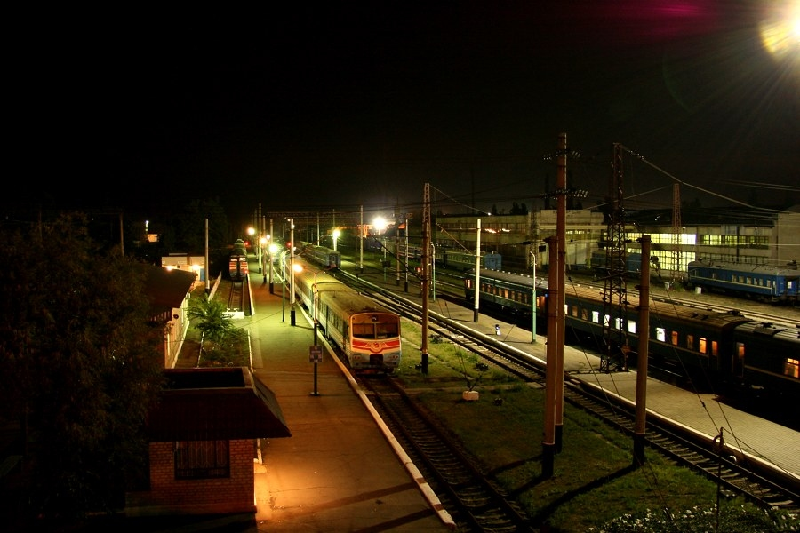 Железнодорожная станция "Дебальцево", Украина